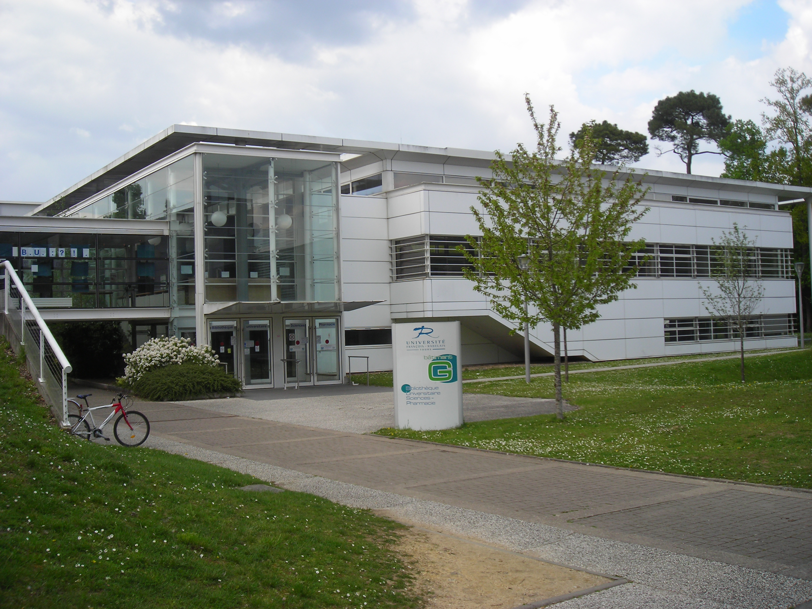 Bibliothèque universitaire Sciences-pharmacie de l'Université de Tours